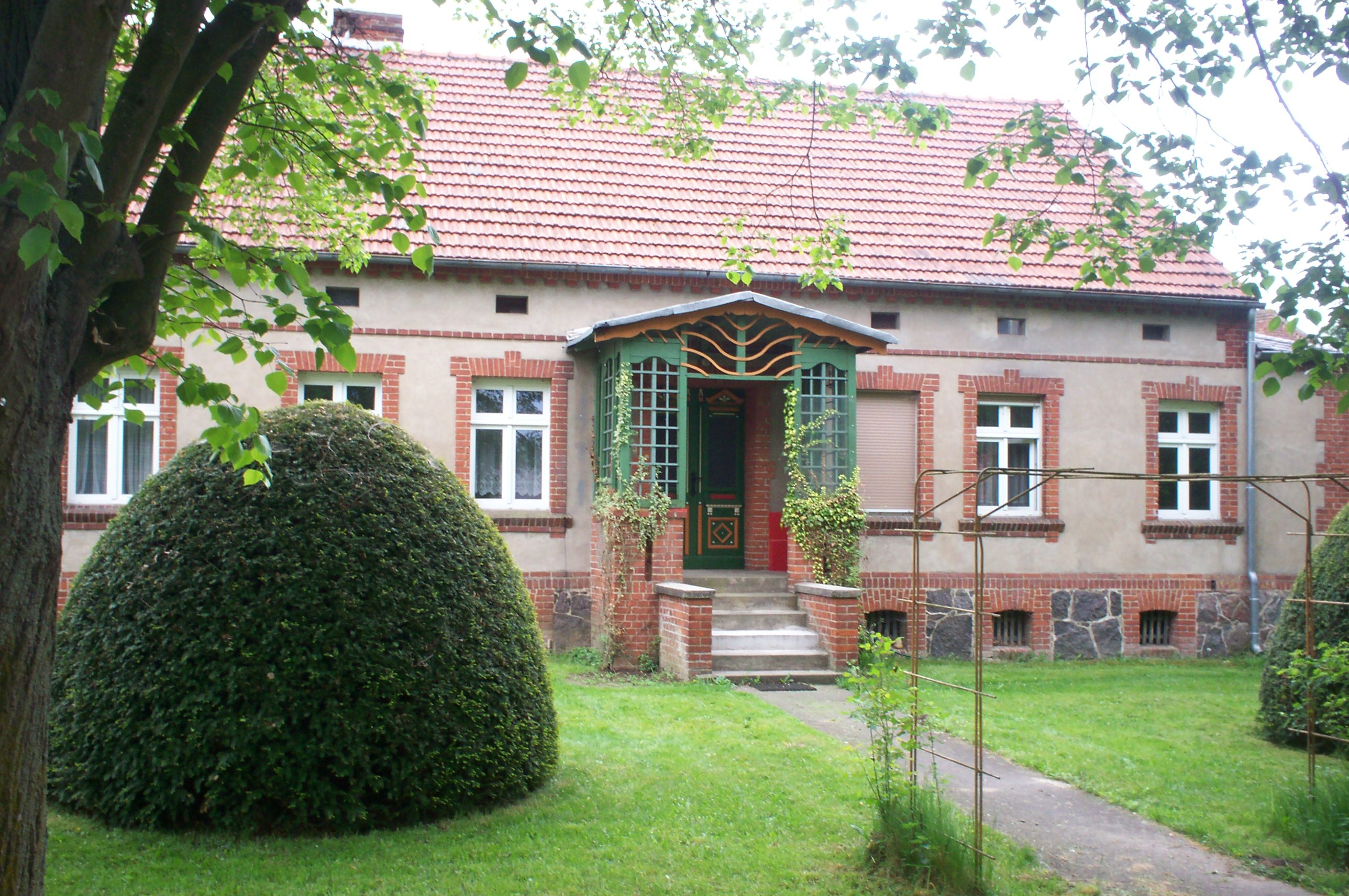 Banzendorf Nr. 9, Nahansicht